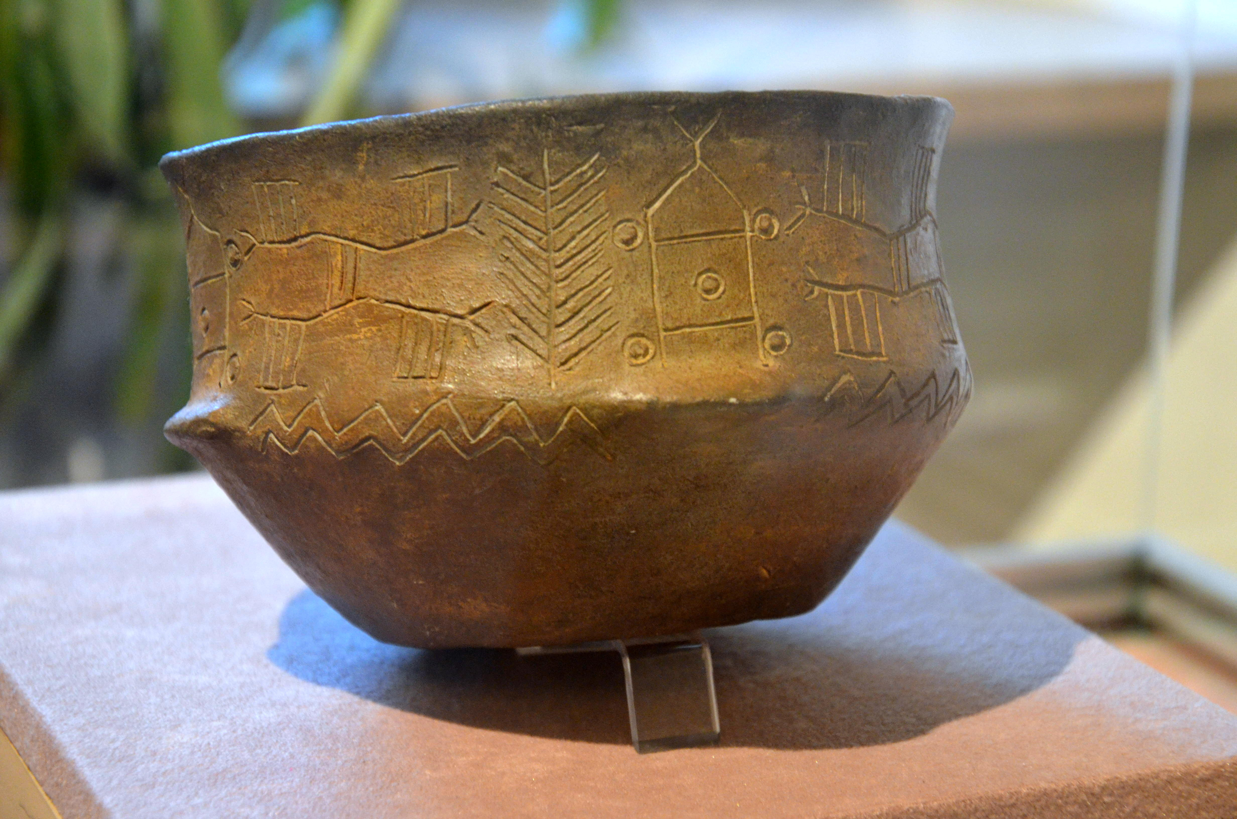 Ein Krug aus Bronocice, 3.550 v. Chr.